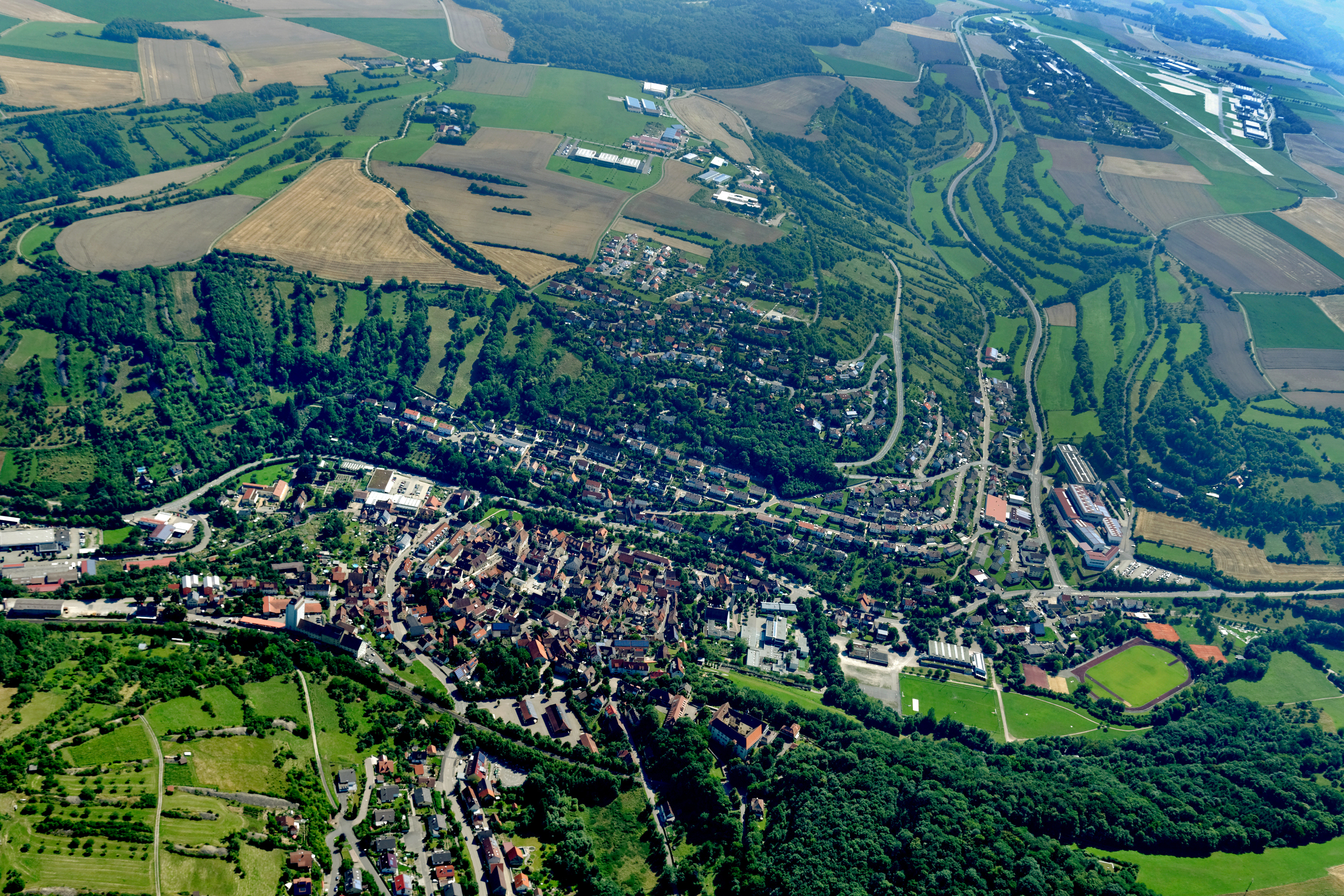 Niederstetten aus dem Flugzeug gesehen.